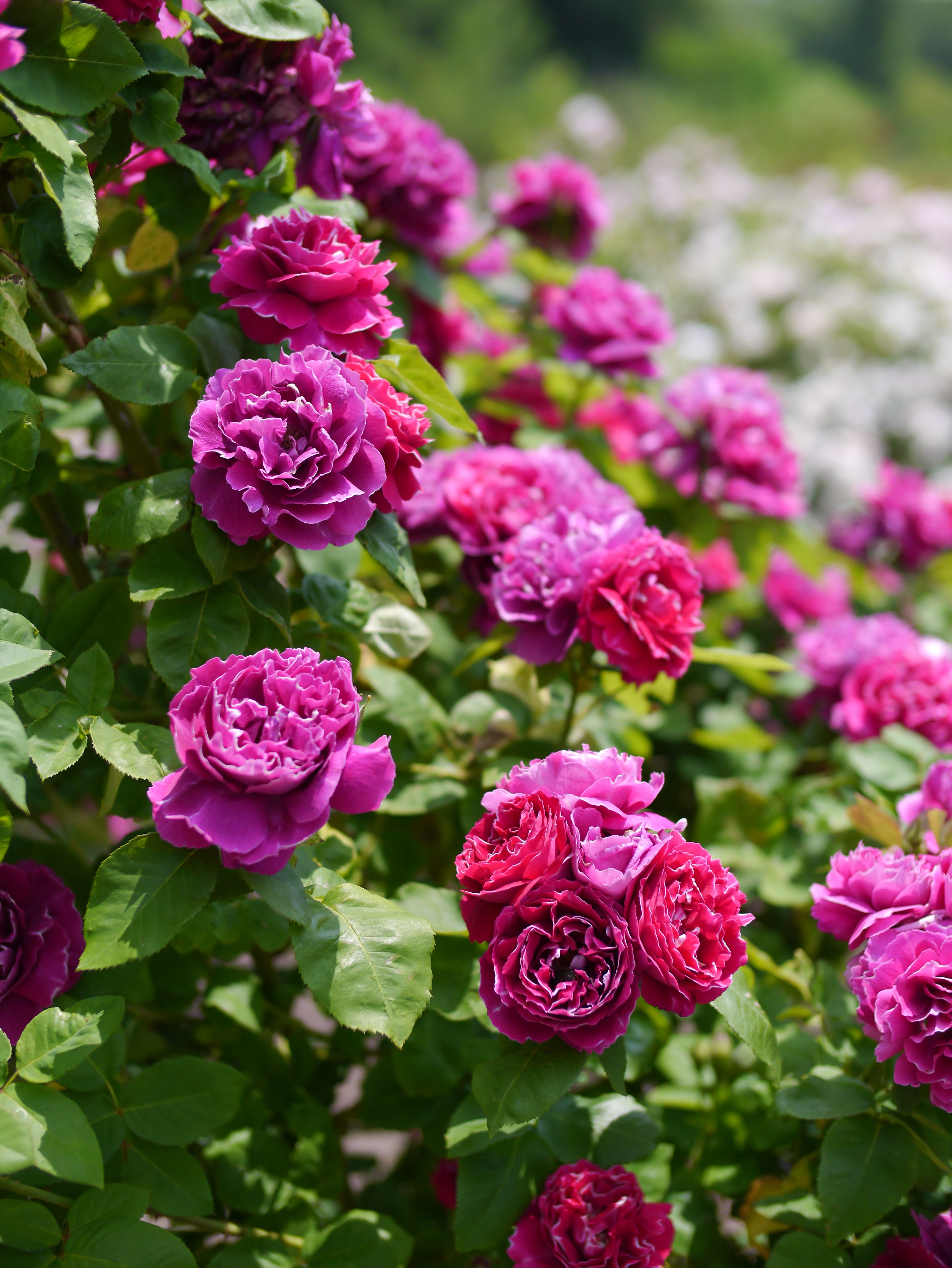 Rose, Baron Girod de l'Ain, バラ, バロン ジロー ド ラン, Old rose オールドローズ France フランス Reverchon 1897